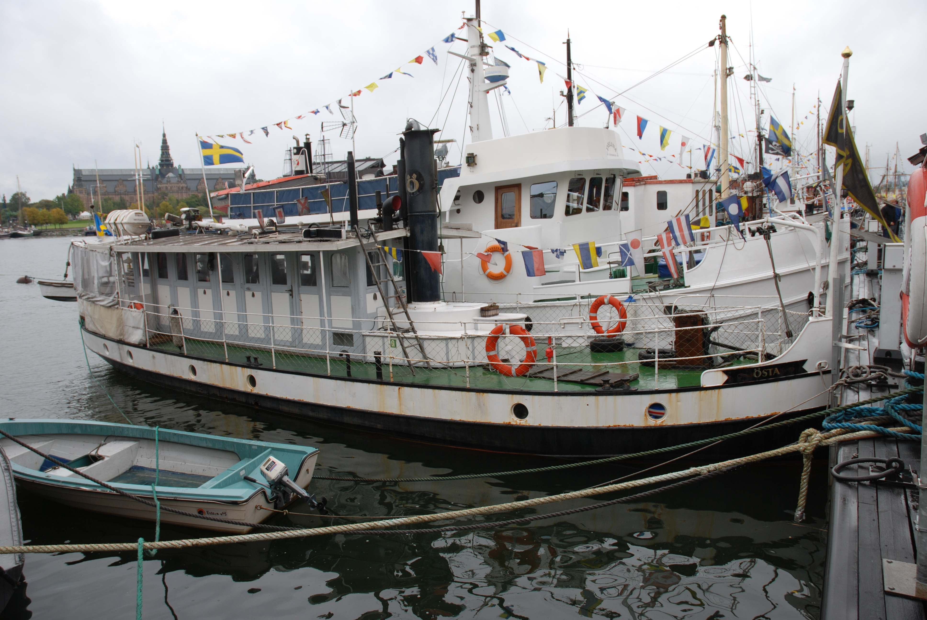 S/S Östa vid Skerppsholmen i Stockholm, 2007 This is an image of a protected Swedish ship, with call sign SJFE .